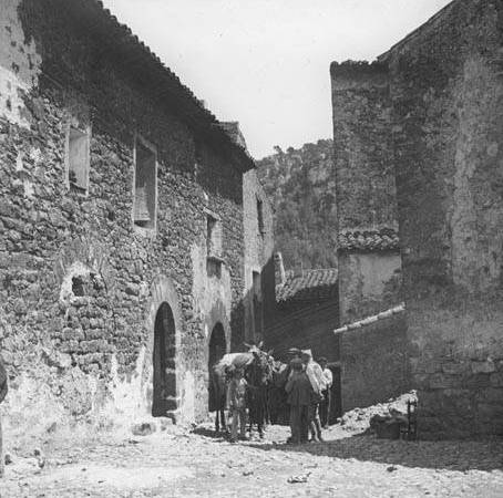 Grup de persones i un ase tirant un carro a la plaça de Farena. Frederic Bordas i Altarriba (ca. 1890)